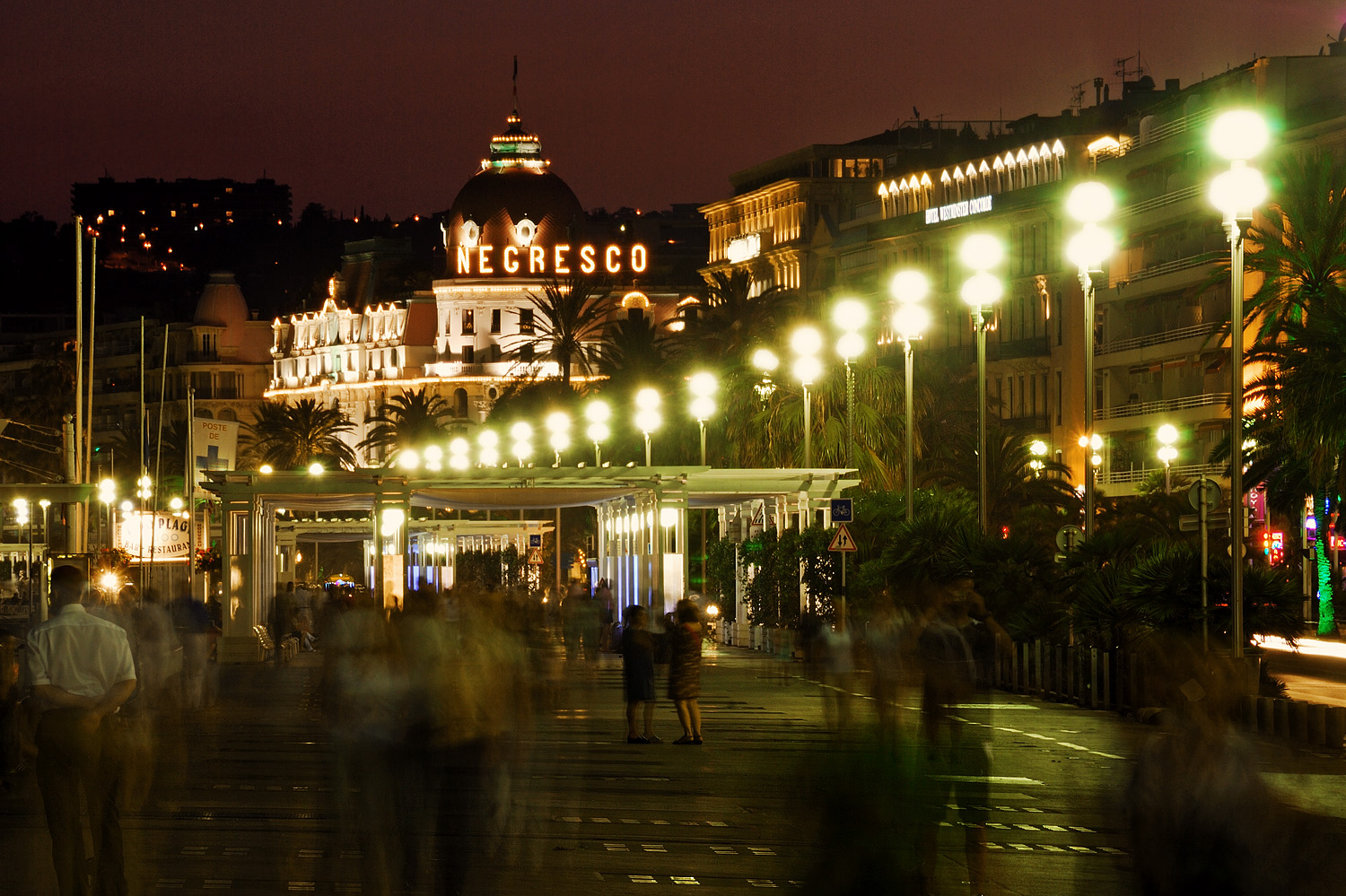 Ницца, Франция. Английская набережная, отель Negresco